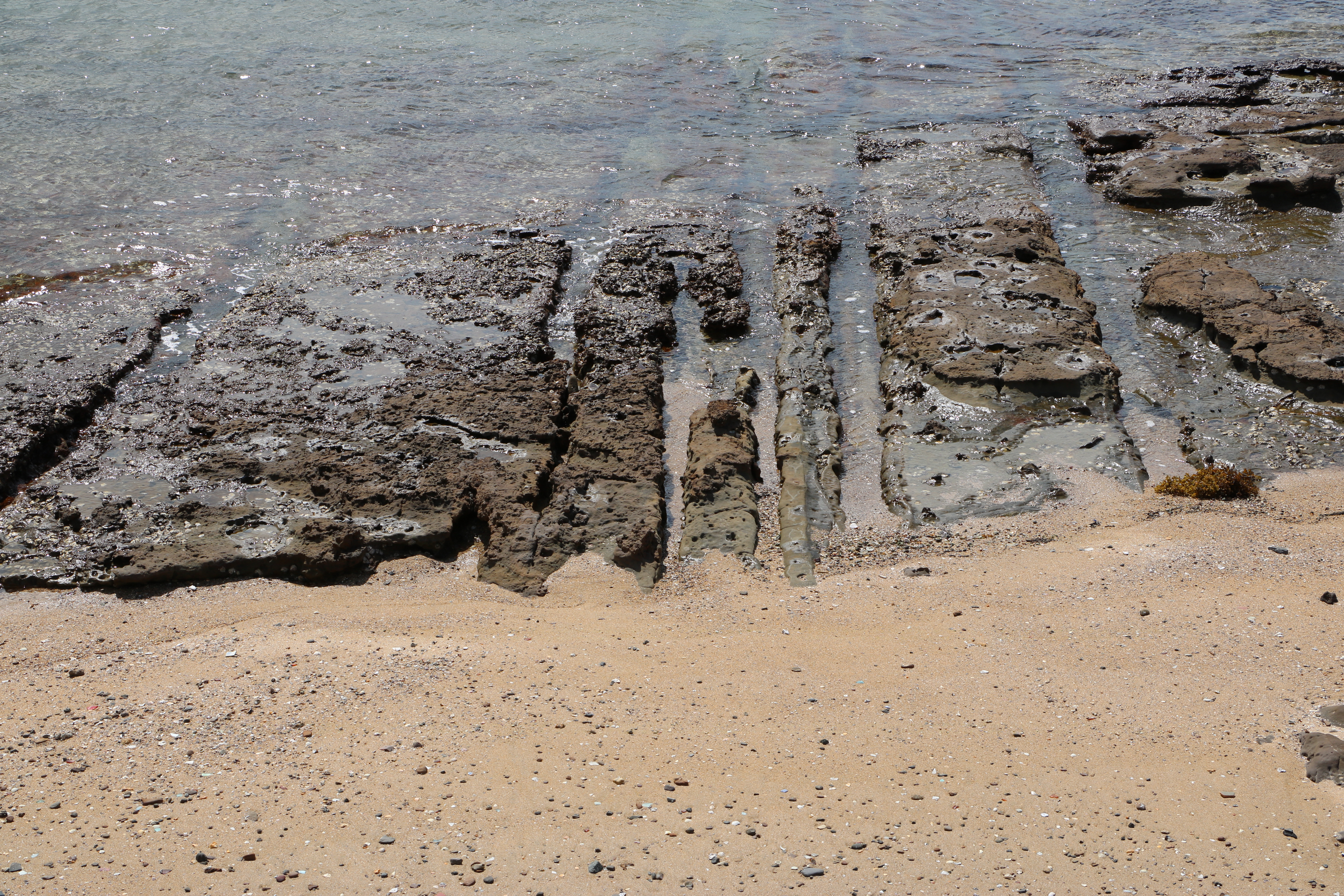 鳥巣半島の泥岩岩脈（国指定天然記念物、和歌山県田辺市）